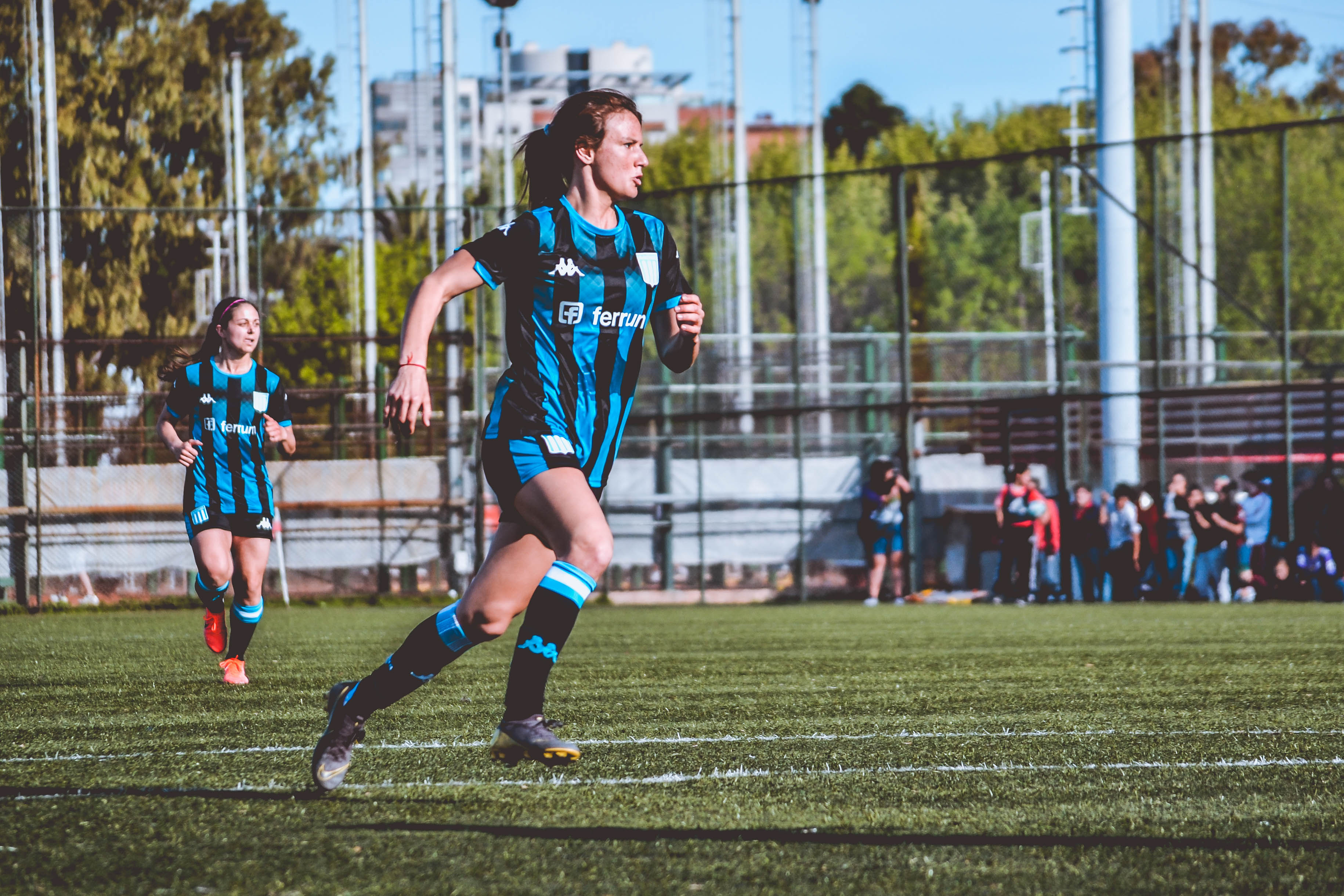 Buenos aires 2019 racing river futbol femenino